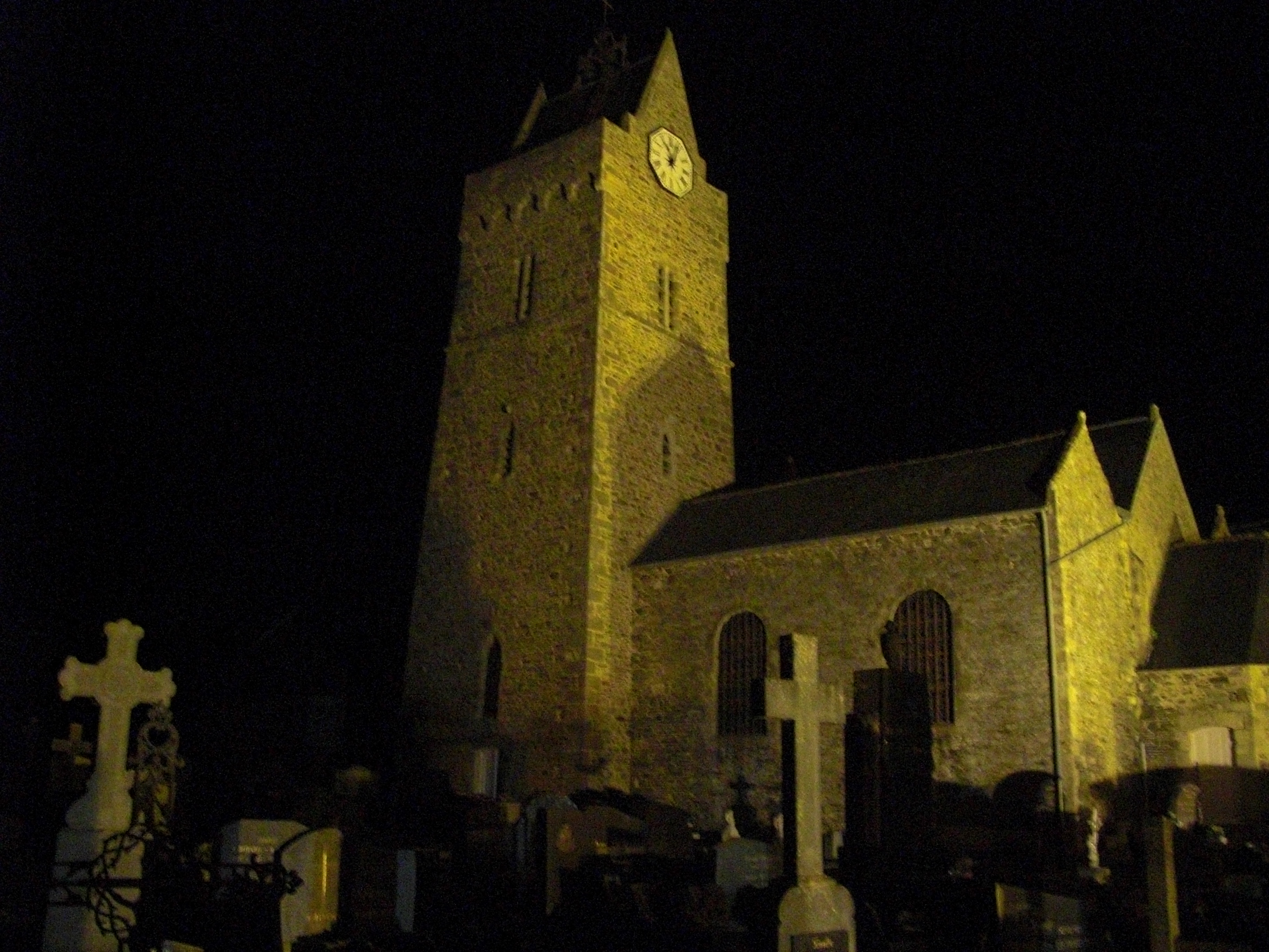 Photographie de l'église vue nocturne mettant en valeur l'architecture de la tour de guet